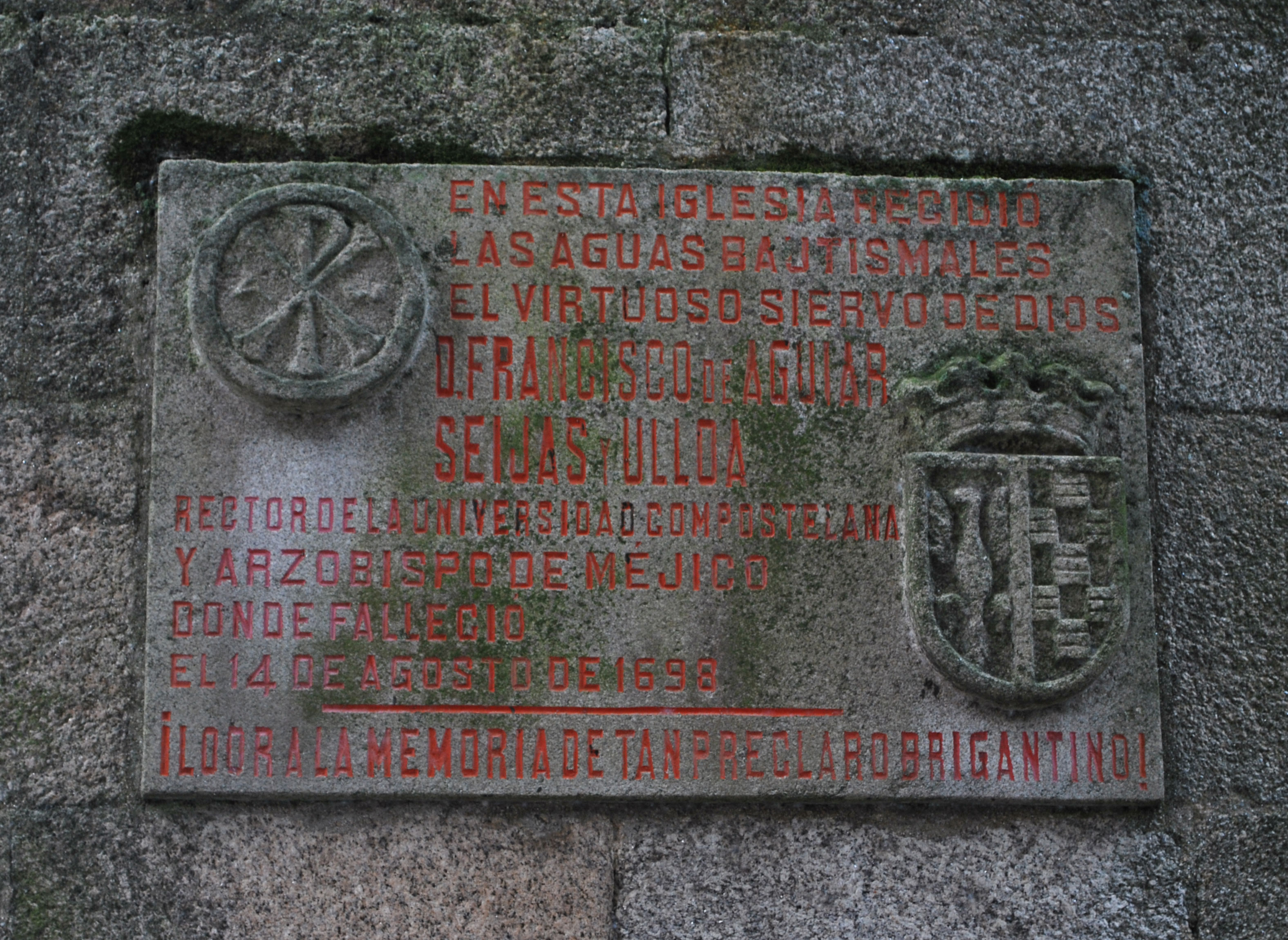 Praca adicada a Francisco de Aguiar Seixas e Ulloa na Igrexa de Santiago en Betanzos A Coruña Galiza Spain